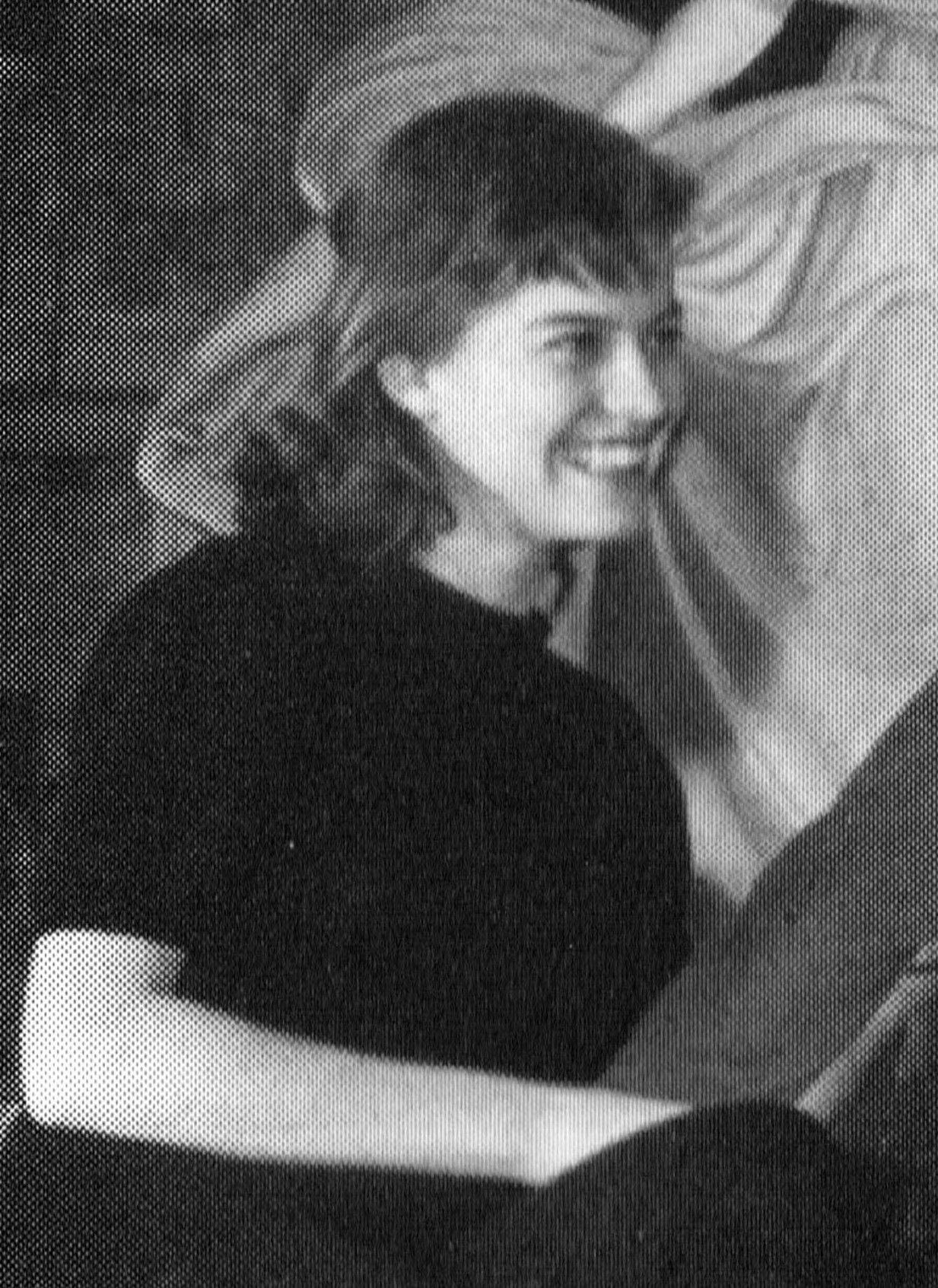 Elsa Prawitz i Marmorfoajén på Dramatens elevskola läsåret 1950-1951, årskurs 1. Publicerad i: Luterkort, I. (1998). Om igen, herr Molander!: Kungl. Dramatiska teaterns elevskola 1787-1964. Stockholm: Stockholmia. s. 127. Även publicerad i: Göranzon, M. & Malmsjö, J. (2012). Scenens lust och magi: Marie Göranzon, Jan Malmsjö, två skådespelare : i samtal med Lena S. Karlsson. Stockholm: Spencer. s. 20.